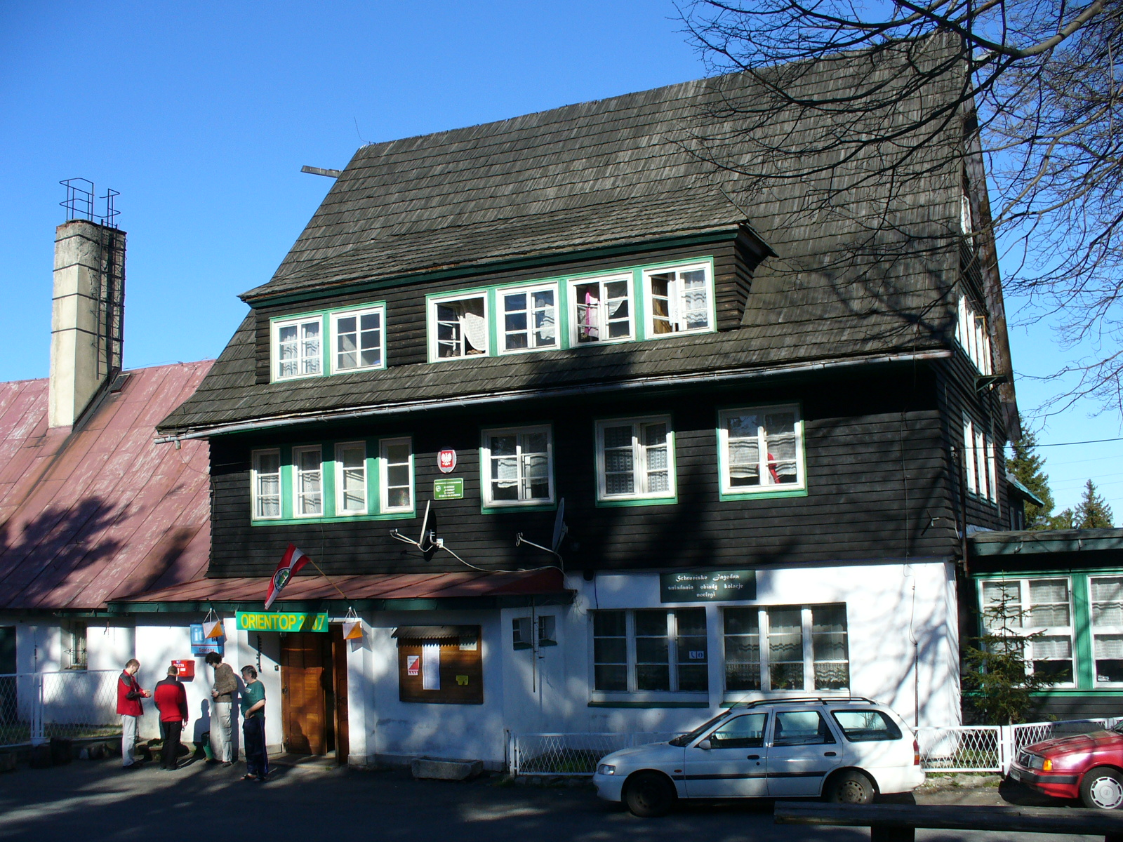 Schronisko Jagodna w Spalonej (Góry Bystrzyckie, Sudety).